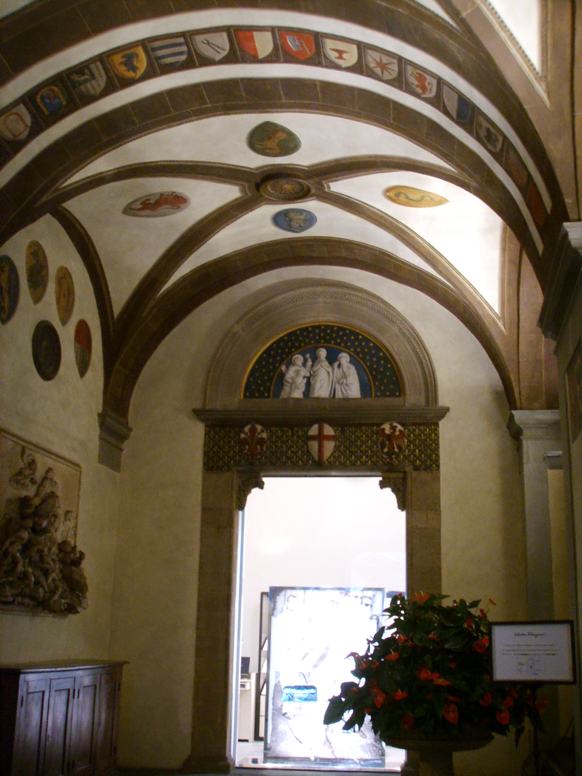 Palazzo Spini Ferroni androne